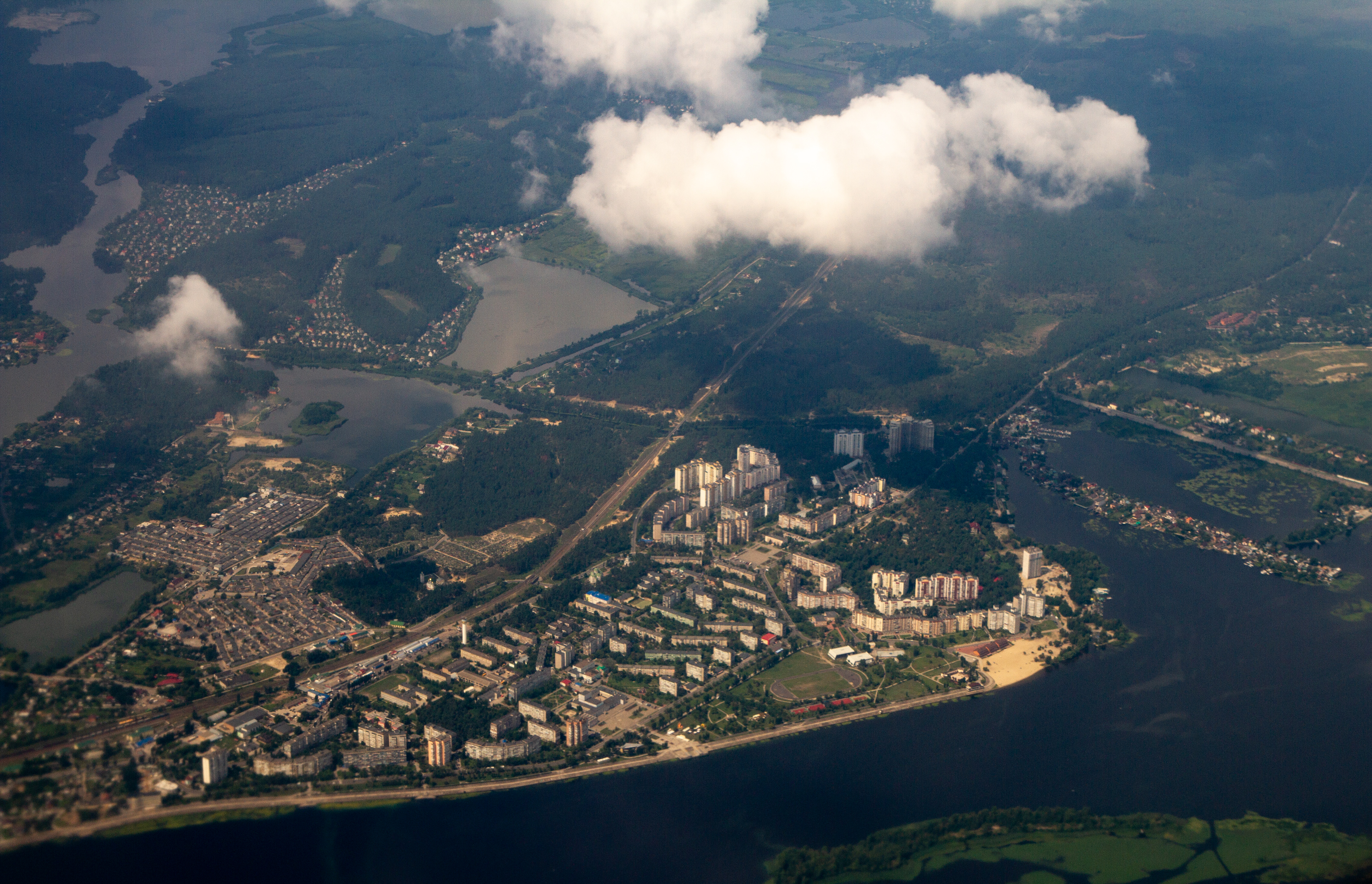 Українка, Київська область. Місто з висоти пташиного польоту